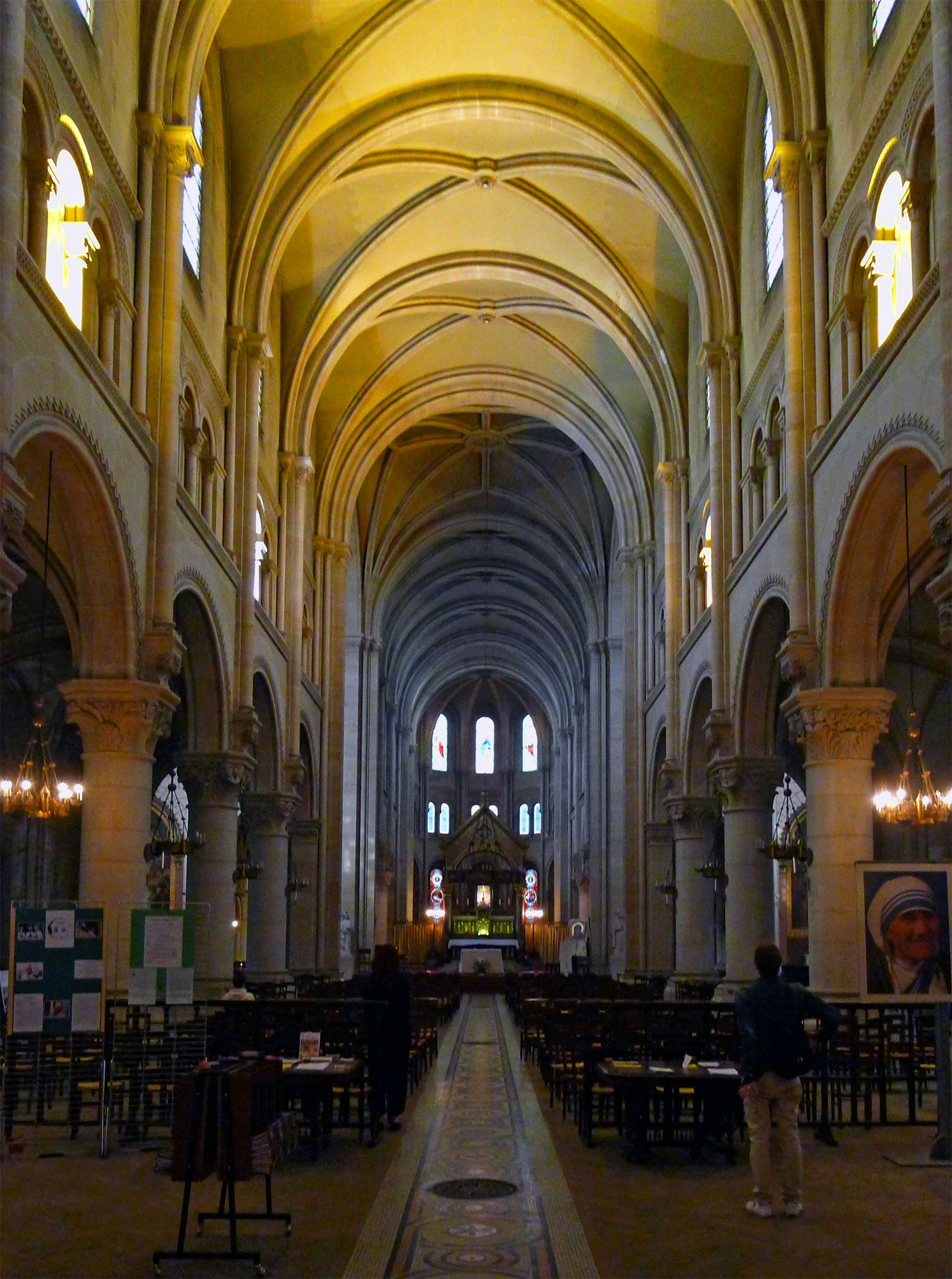 Église Saint-Ambroise (Inscrit) - n°71 boulevard Voltaire - nef - Paris XI .